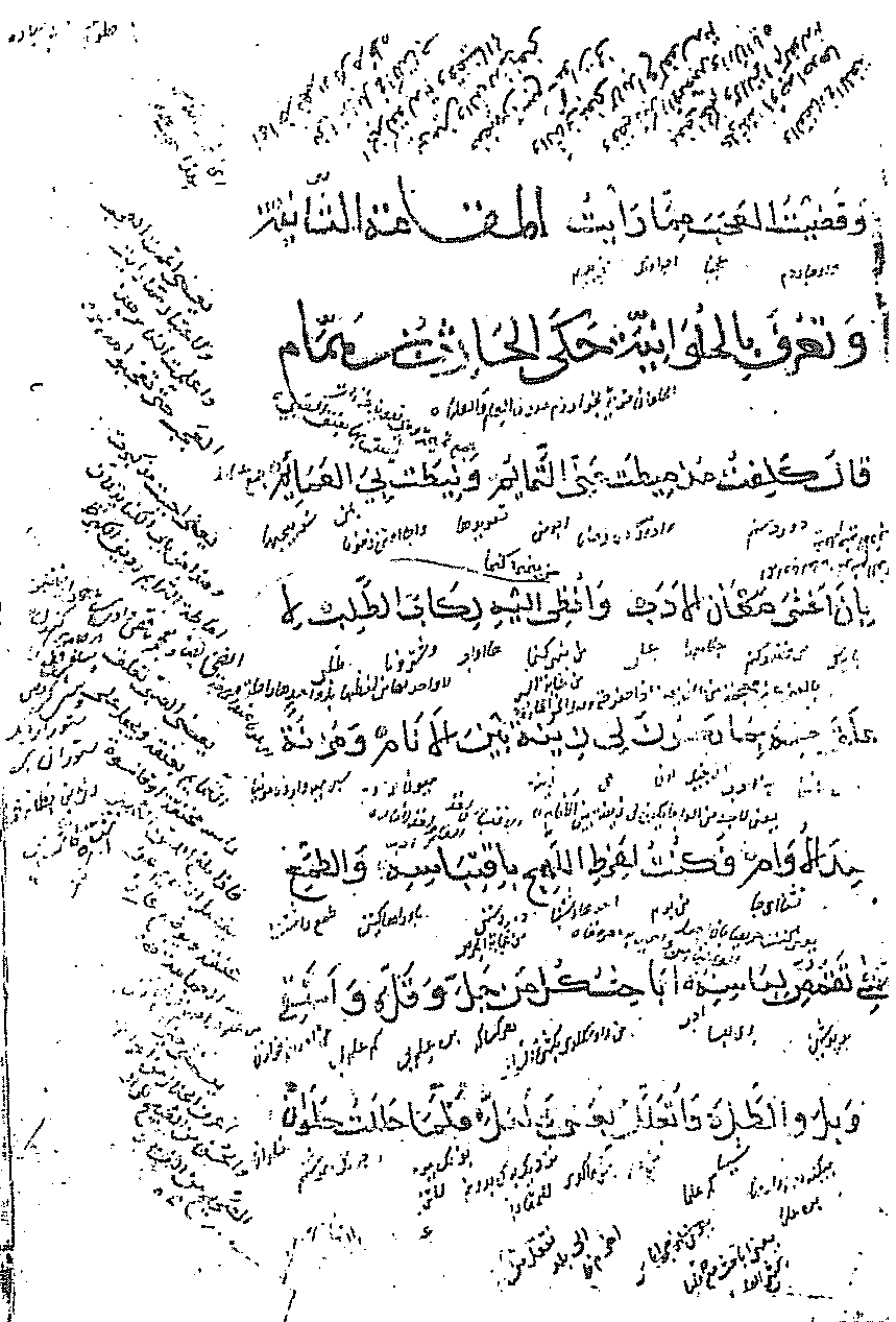 مازِرونی: مقامات حریری ِگلکی دگاردسته که زیدیه گدر شنه